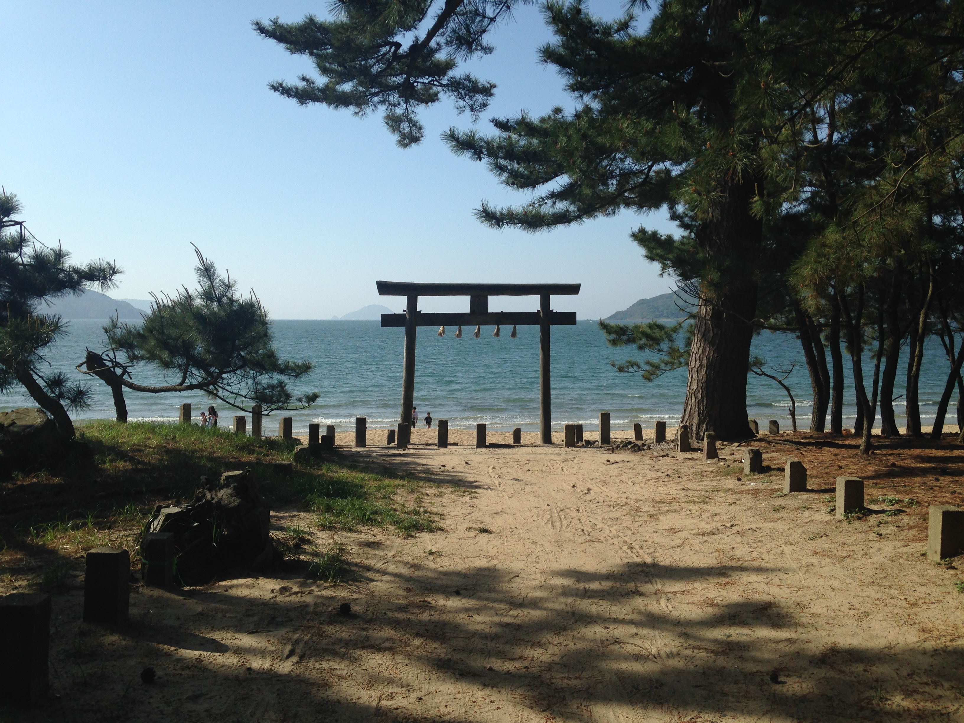 生の松原海水浴場にある壱岐神社の鳥居